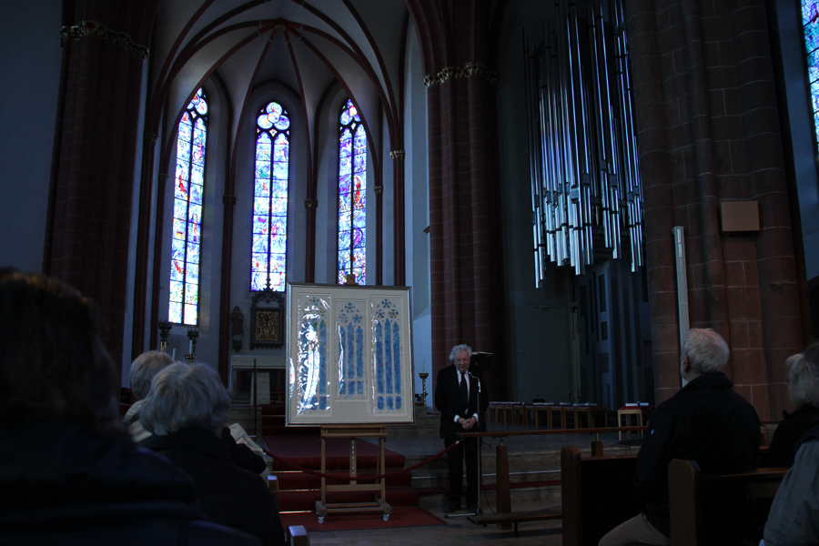 Monsignore Klaus Mayer erklärt in der Mainzer St. Stephanskirche die Entwurfszeichnung von Marc Chagall für die Langhausfenster. In der rechten Bildhäfte die Klais-Orgel.